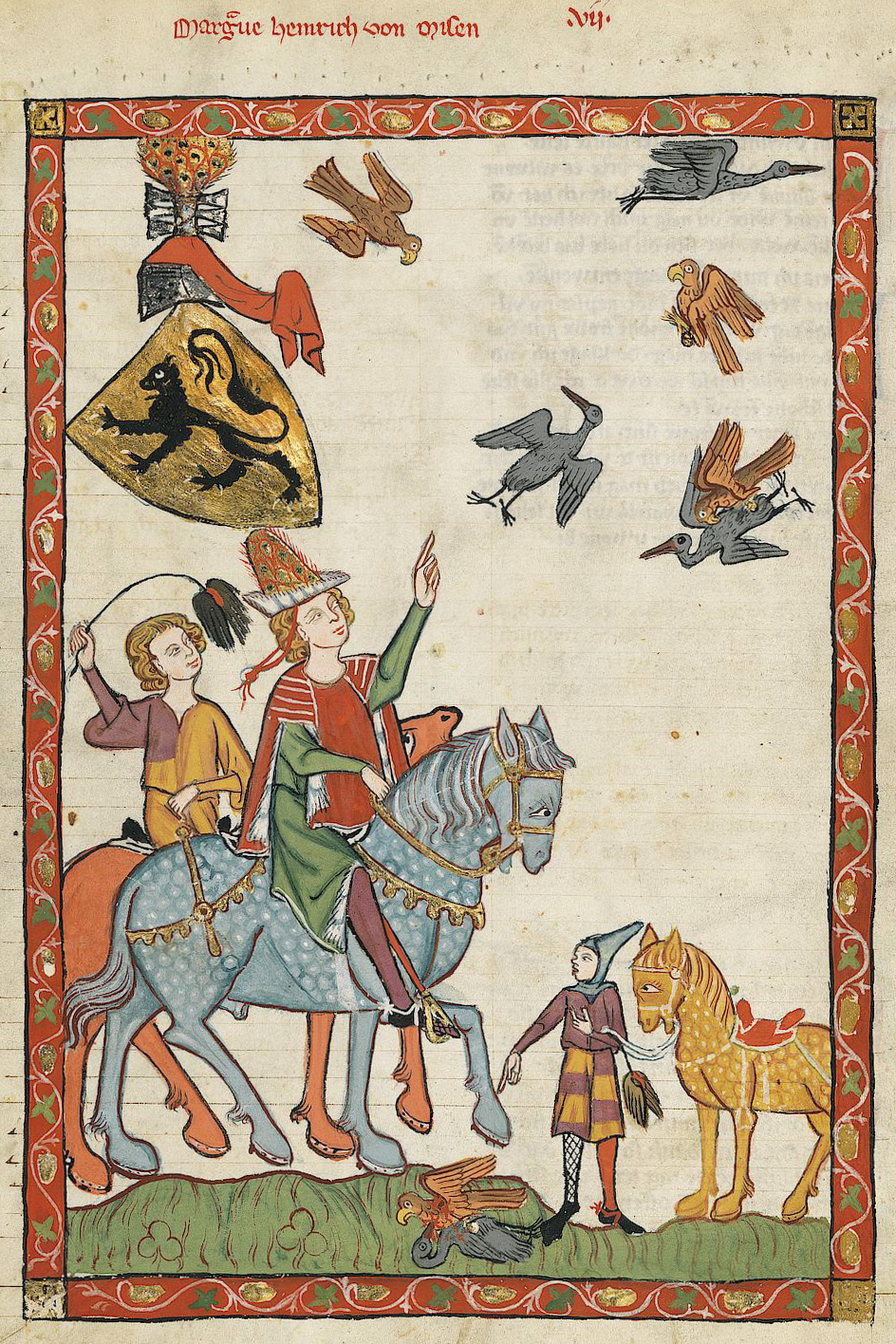 Codex Manesse, UB Heidelberg, Cod. Pal. germ. 848, fol. 14v, Markgraf Heinrich von Meißen